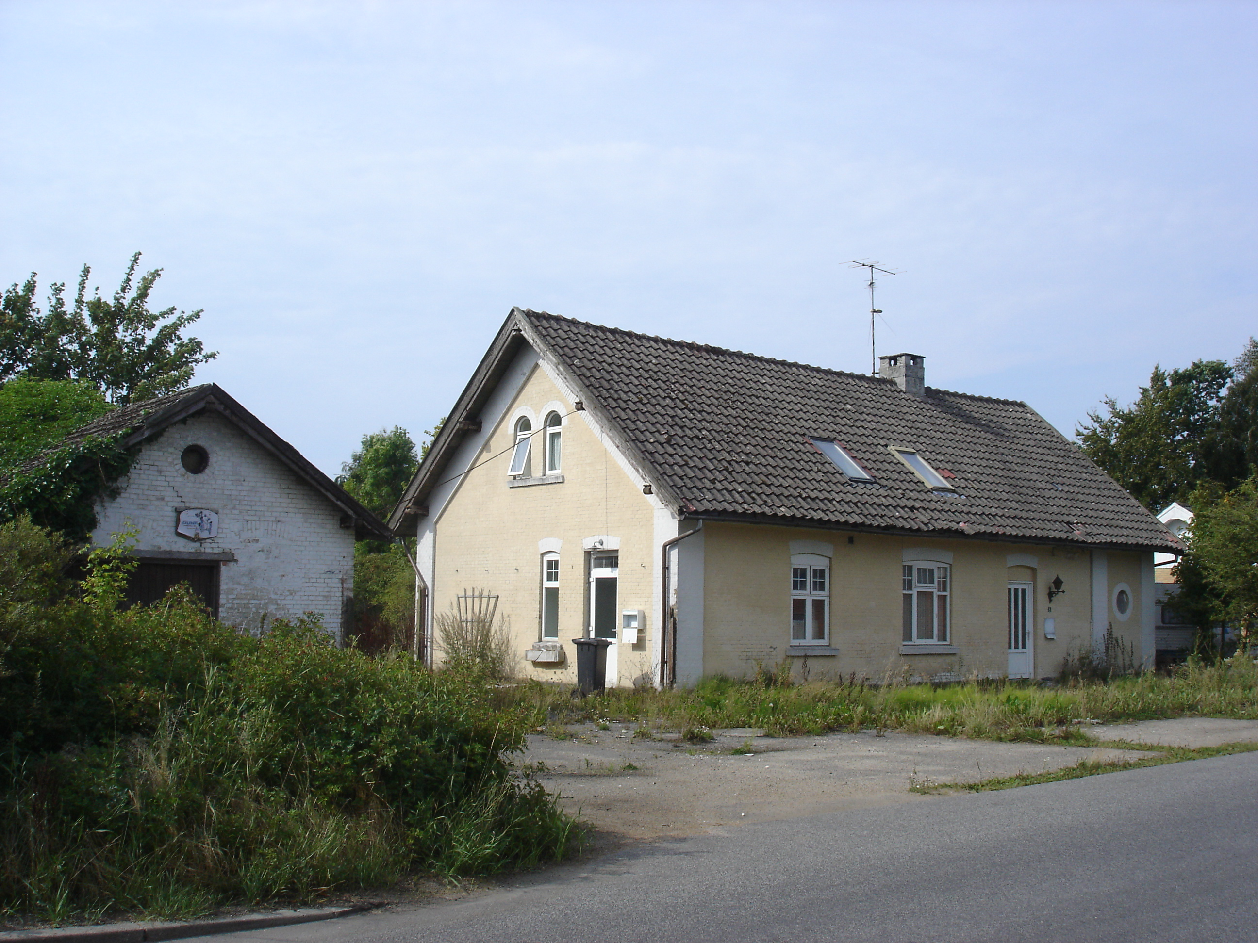 Skelund Station fra vejsiden. Nedrevet i februar 2015